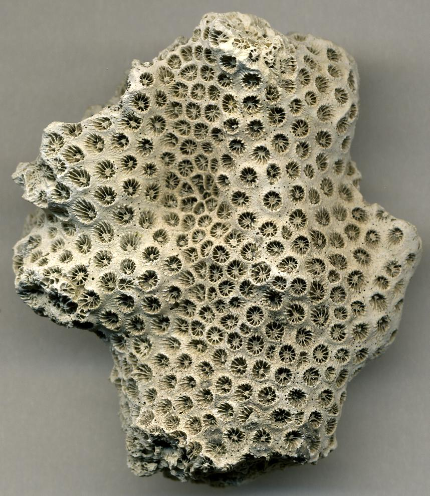 Solenastrea hyades, fósil de 5,3 cm, Croatan Formation, Carolina del Norte, EE.UU.